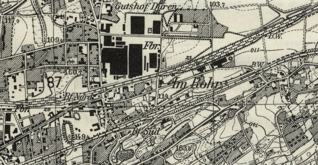 Karte des Bahnhofsviertels Witen Annen-Nord Bf und Witten-Annen Süd Bf